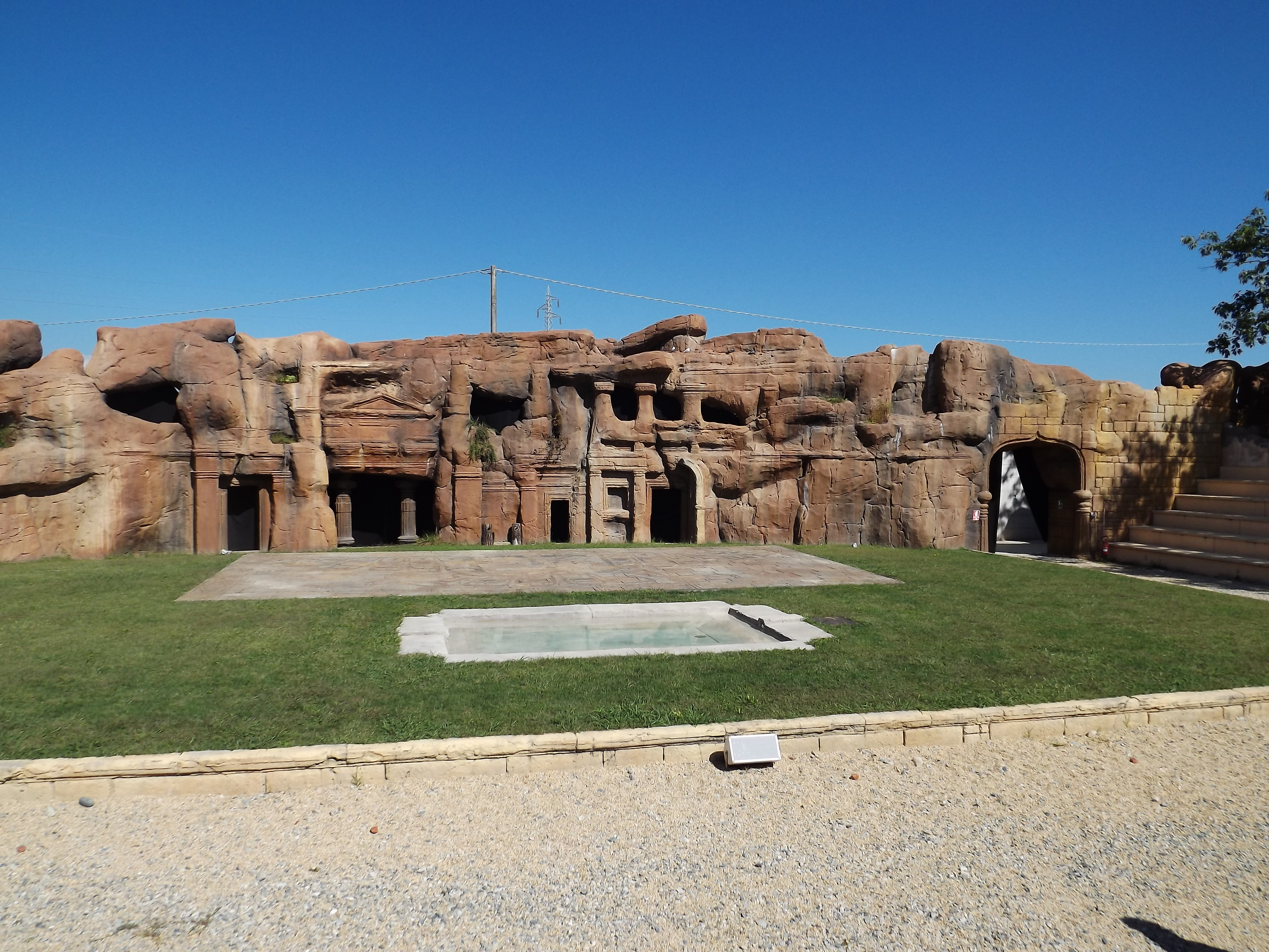 L'Anfiteatro di Pietra all'interno del bioparco Zoom a Cumiana (TO).